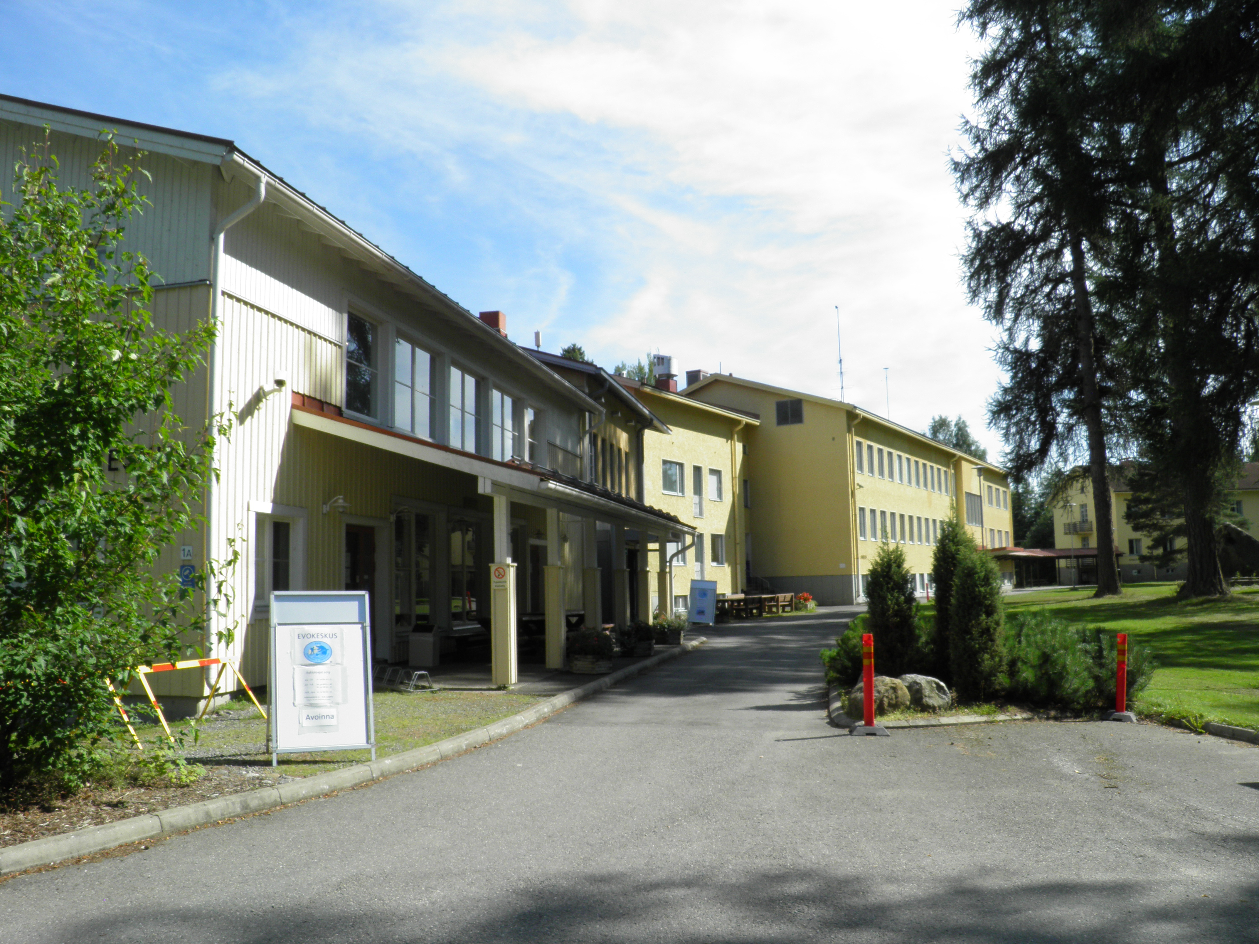 Evokeskusta Hämeenlinnan Lammin Evolla.